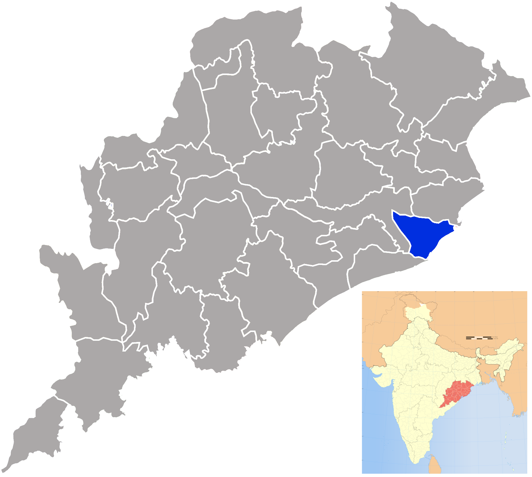 Distrito de Jagatsinghpur en Orissa